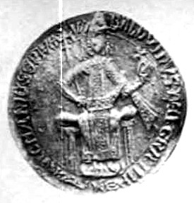 Sceaux de Baudouin II de Courtenay